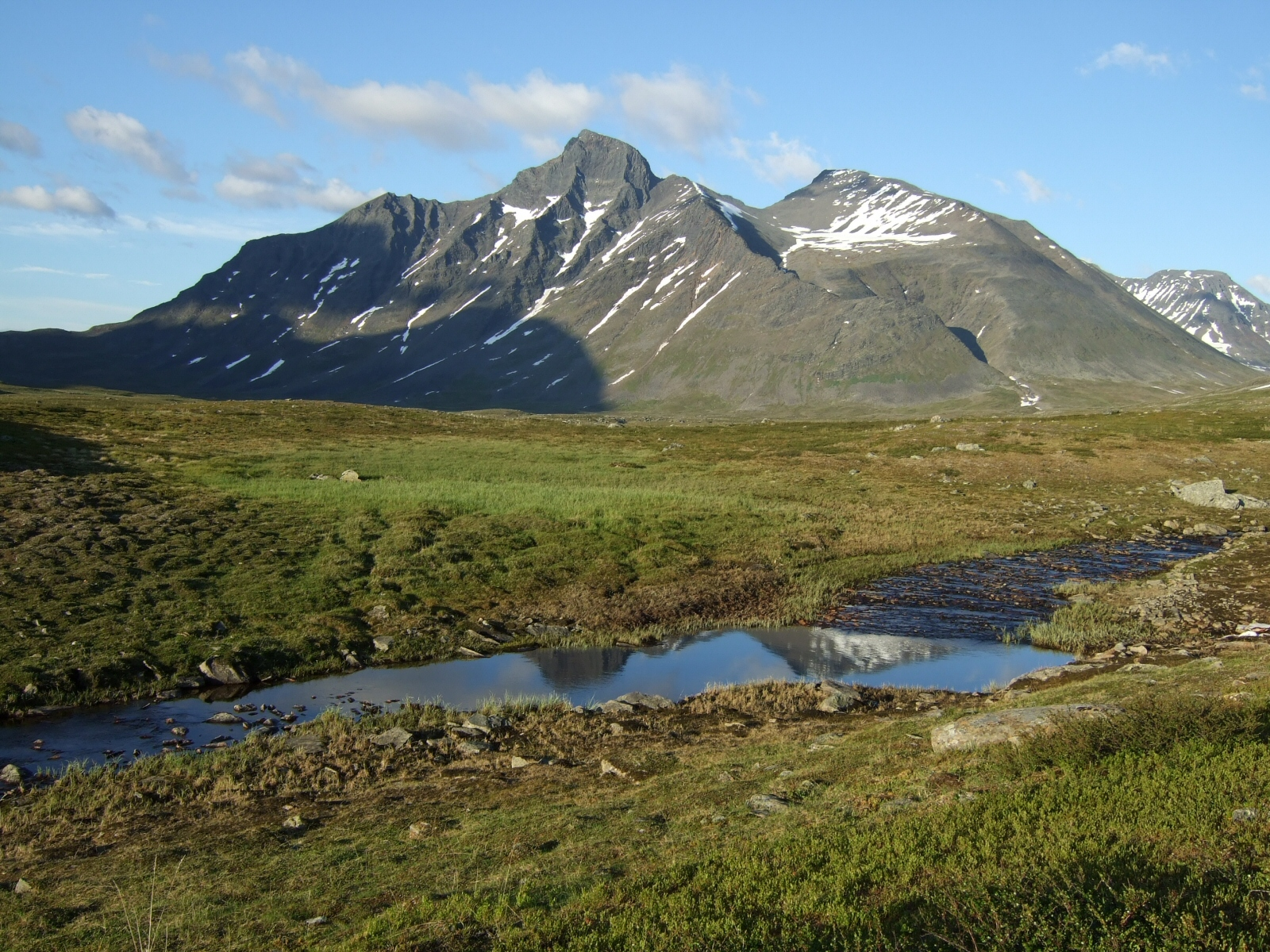 Pierikpakte mountain in Sarek National Park, Sweden